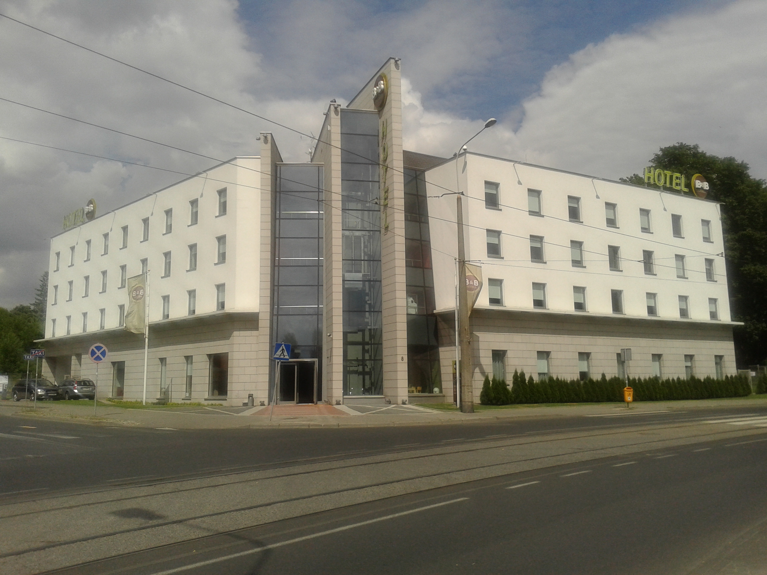 Hotel B&B w Toruniu - ulica Szumana 8